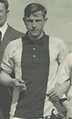 Ари Луи Сейлхауэр - нидерландский футболист.